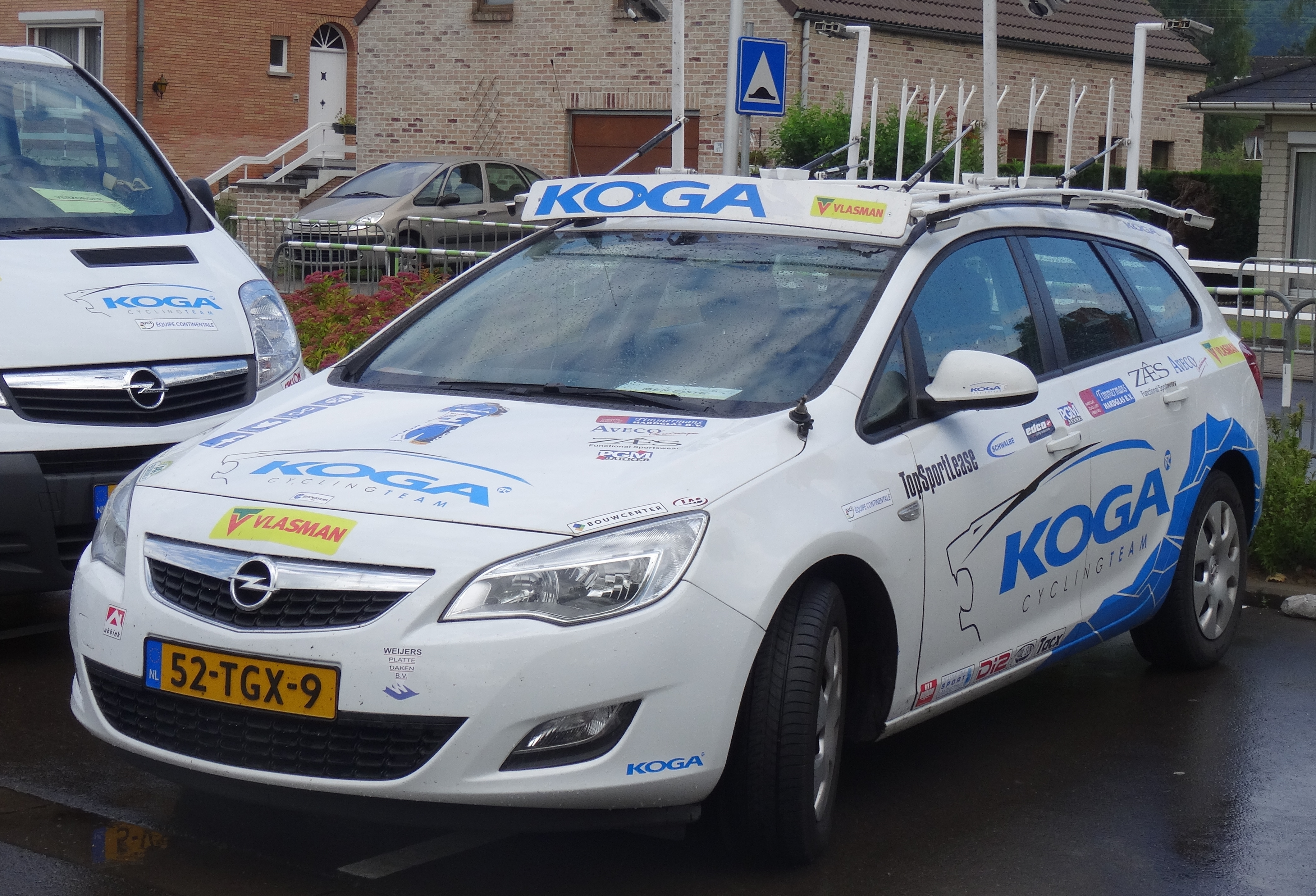 Reportage photographique réalisé le dimanche 8 juin à l'occasion du départ du Mémorial Philippe Van Coningsloo 2014 à Wavre, Belgique.